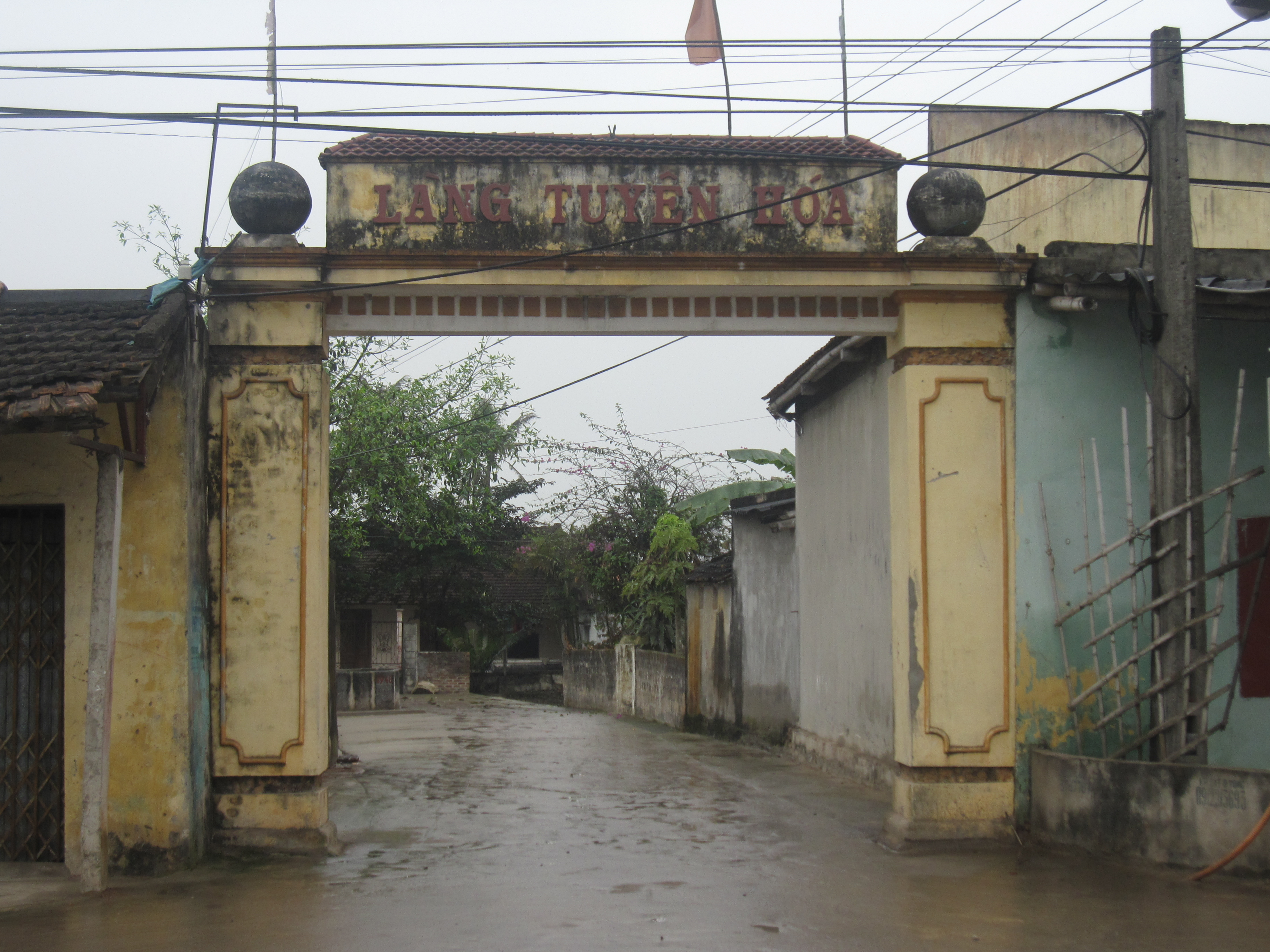 Cổng làng Tuyên Hóa, xã Đông Anh, Đông Sơn, Thanh Hóa, Việt Nam